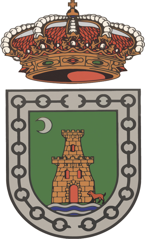 Escudo Oficial del Ayuntamiento de Ceutí